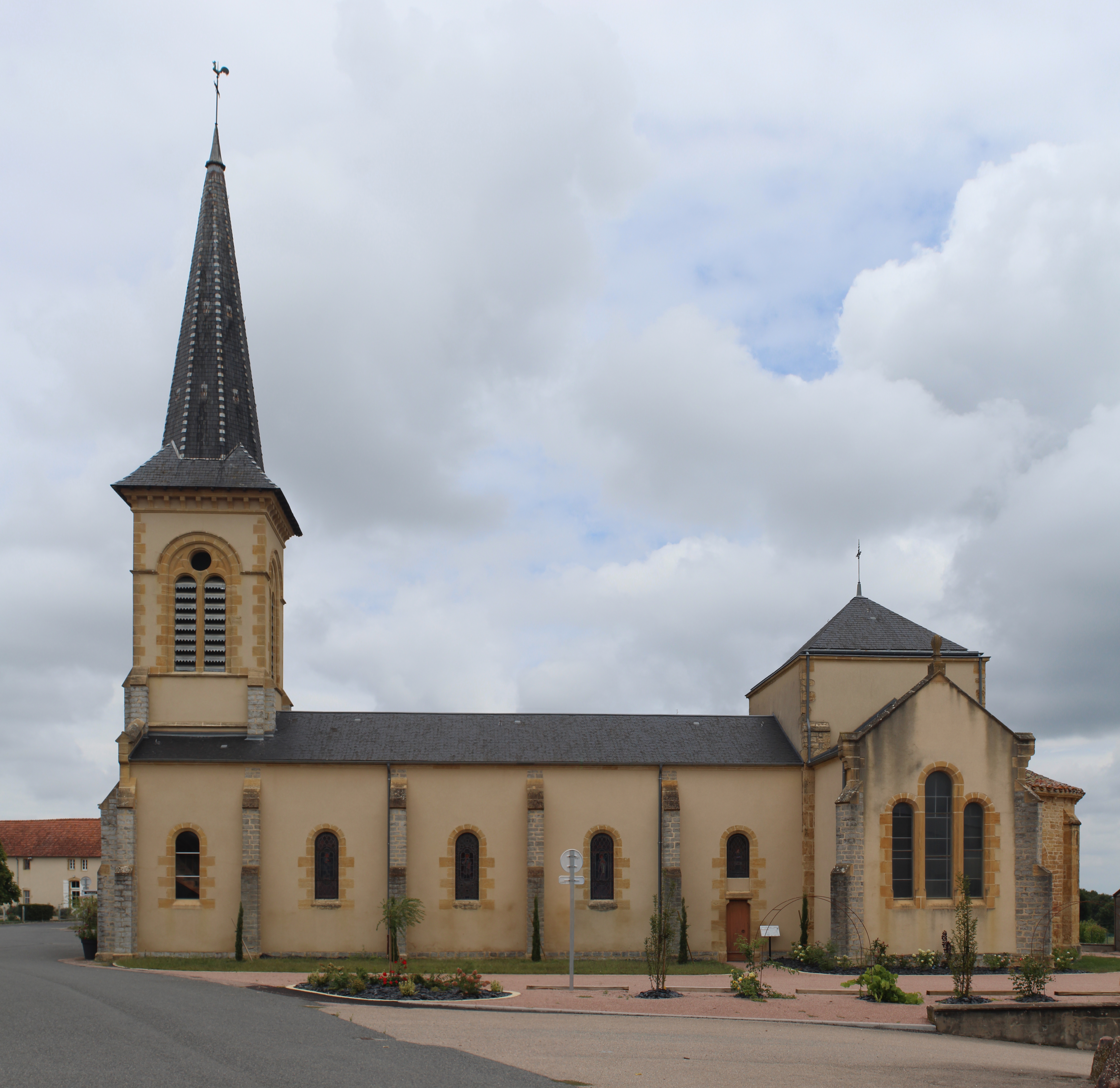 Église Saint-Honorat d'Avrilly, Allier.